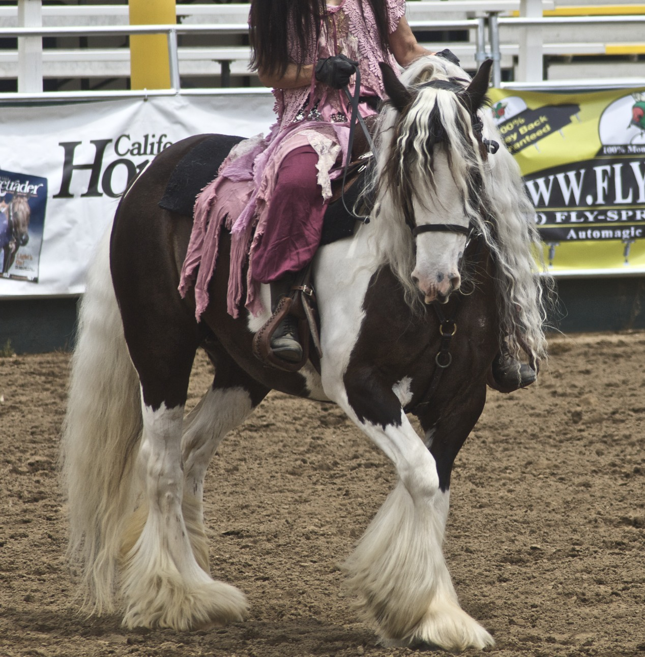 Gypsy Vanner Horse